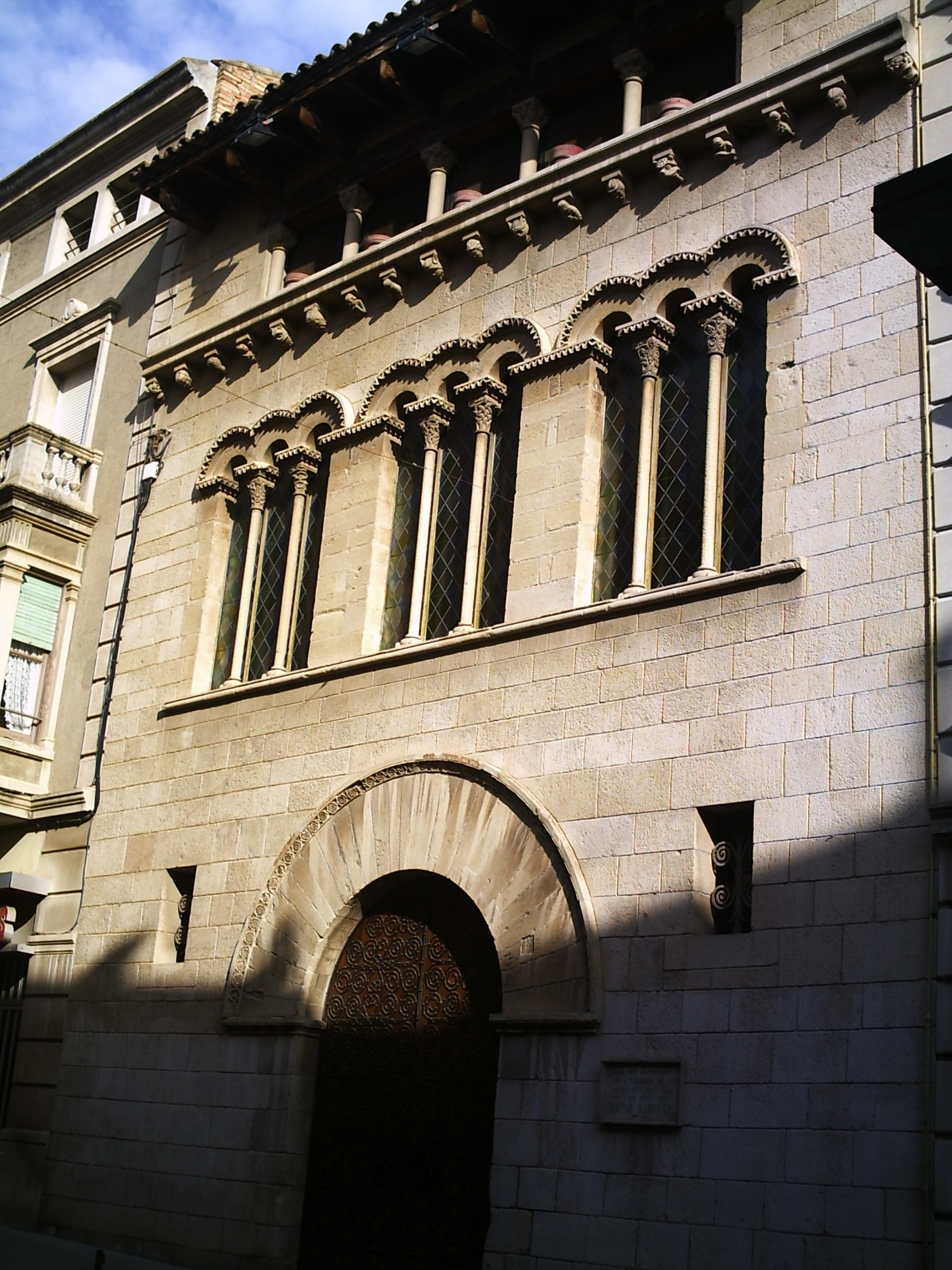 Català_ Palau dels Marquesos i la Floresta, a Tàrrega, d'estil romànic data del seglñe XIII.